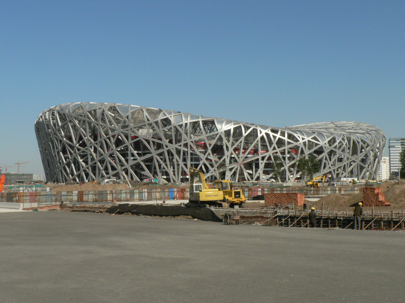 北京国家体育场（建设中）外景，杨男摄于2007年10月27日。